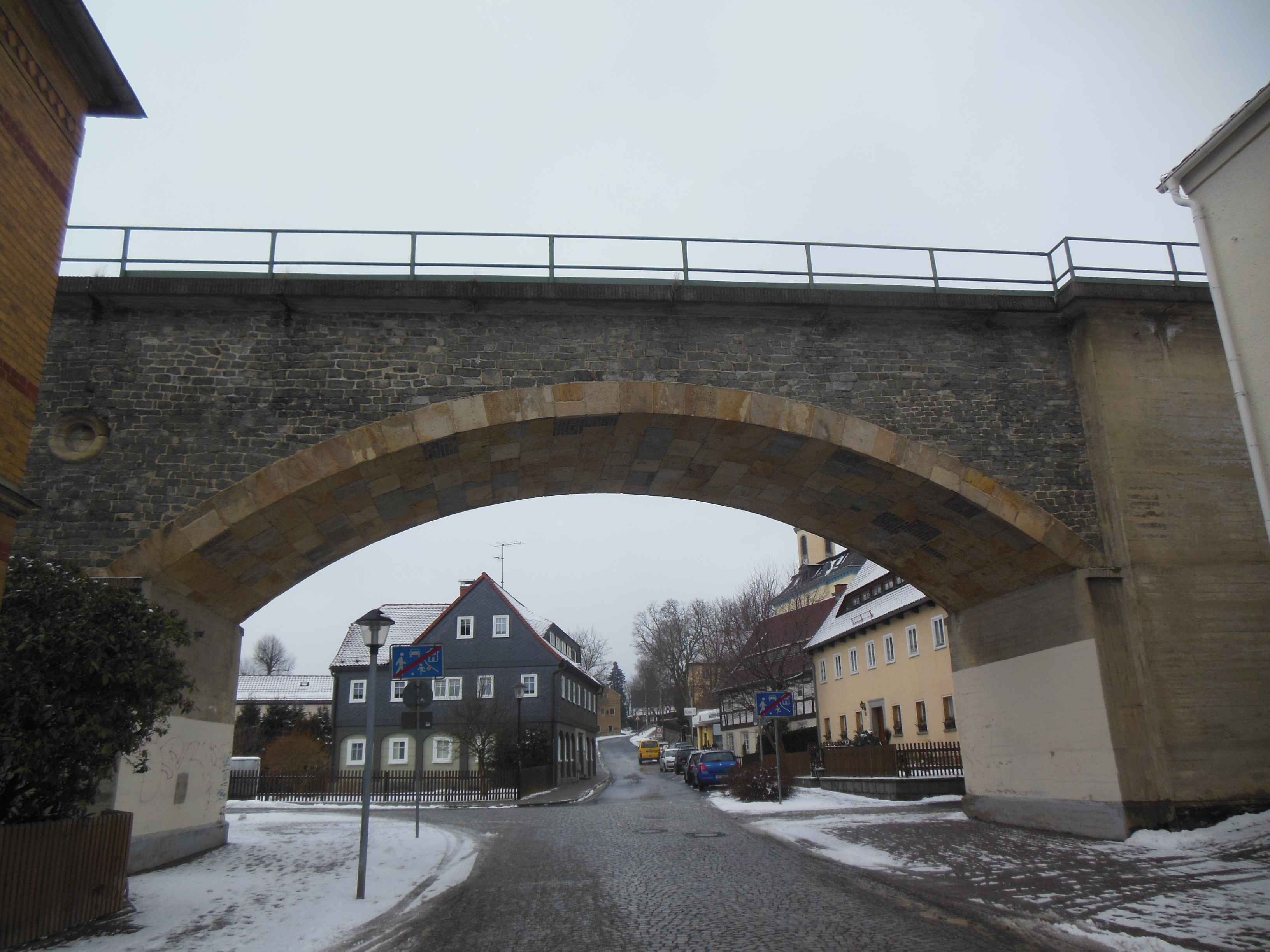 Seifhennersdorf (Landkreis Görlitz). Rumburger Straße, eisenbahnviadukt.